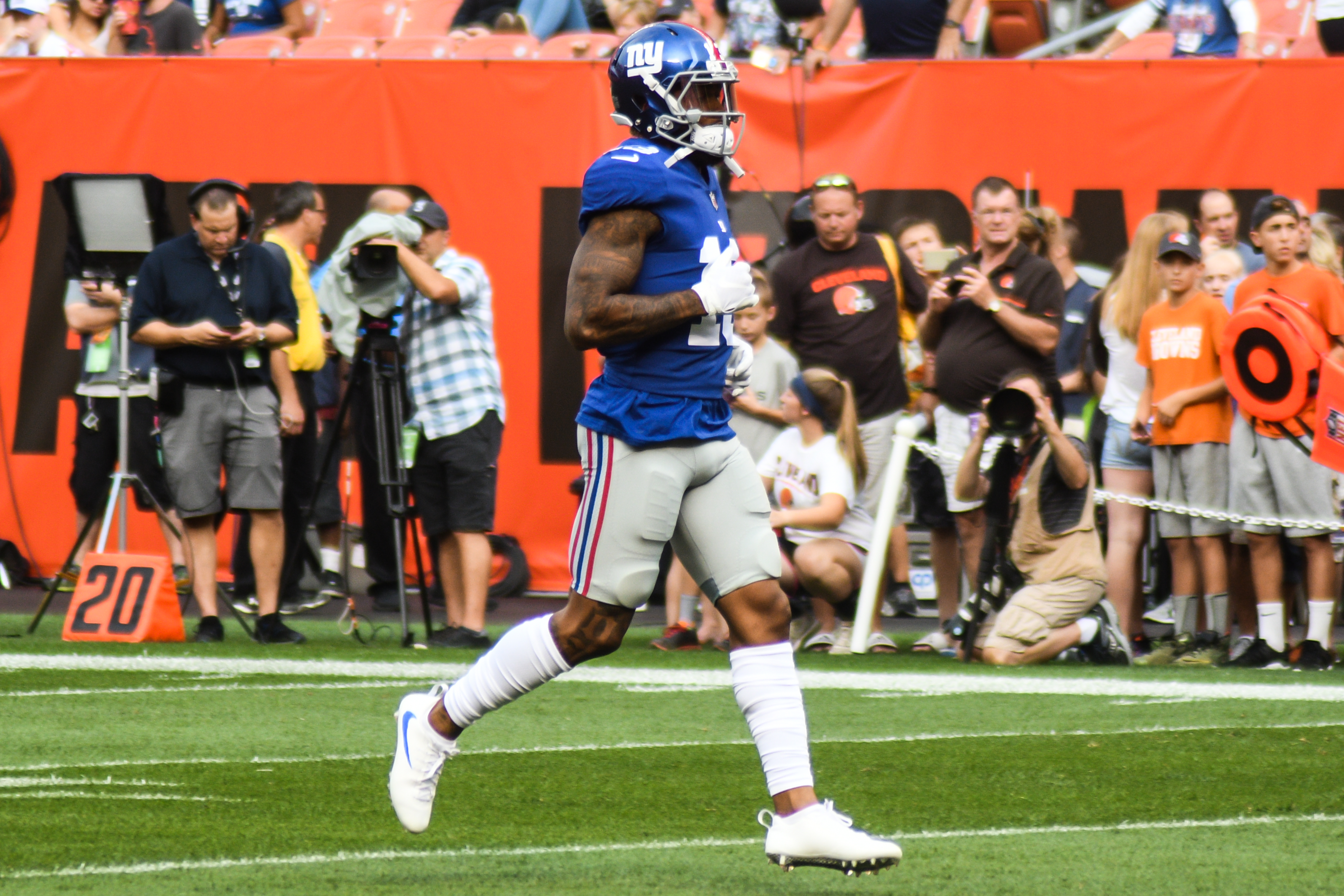 Odell Beckham Jr.